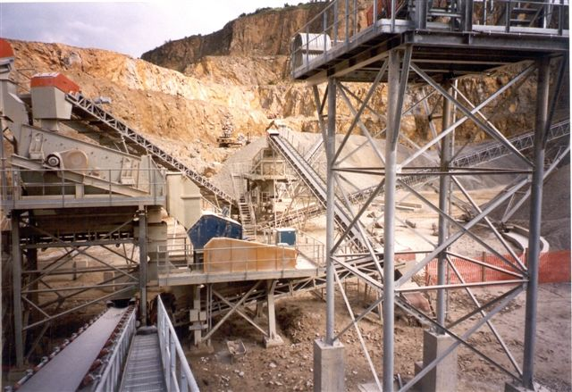 Kalksteinbruch mit Aufbereitungsanlage (Siebmaschine )bei Belgrad/Serbien.